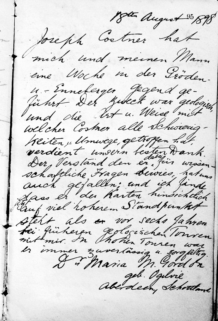 Maria Matilda Ogilvie Gordon Eintrag im Tourenbuch von Joseph Kostner